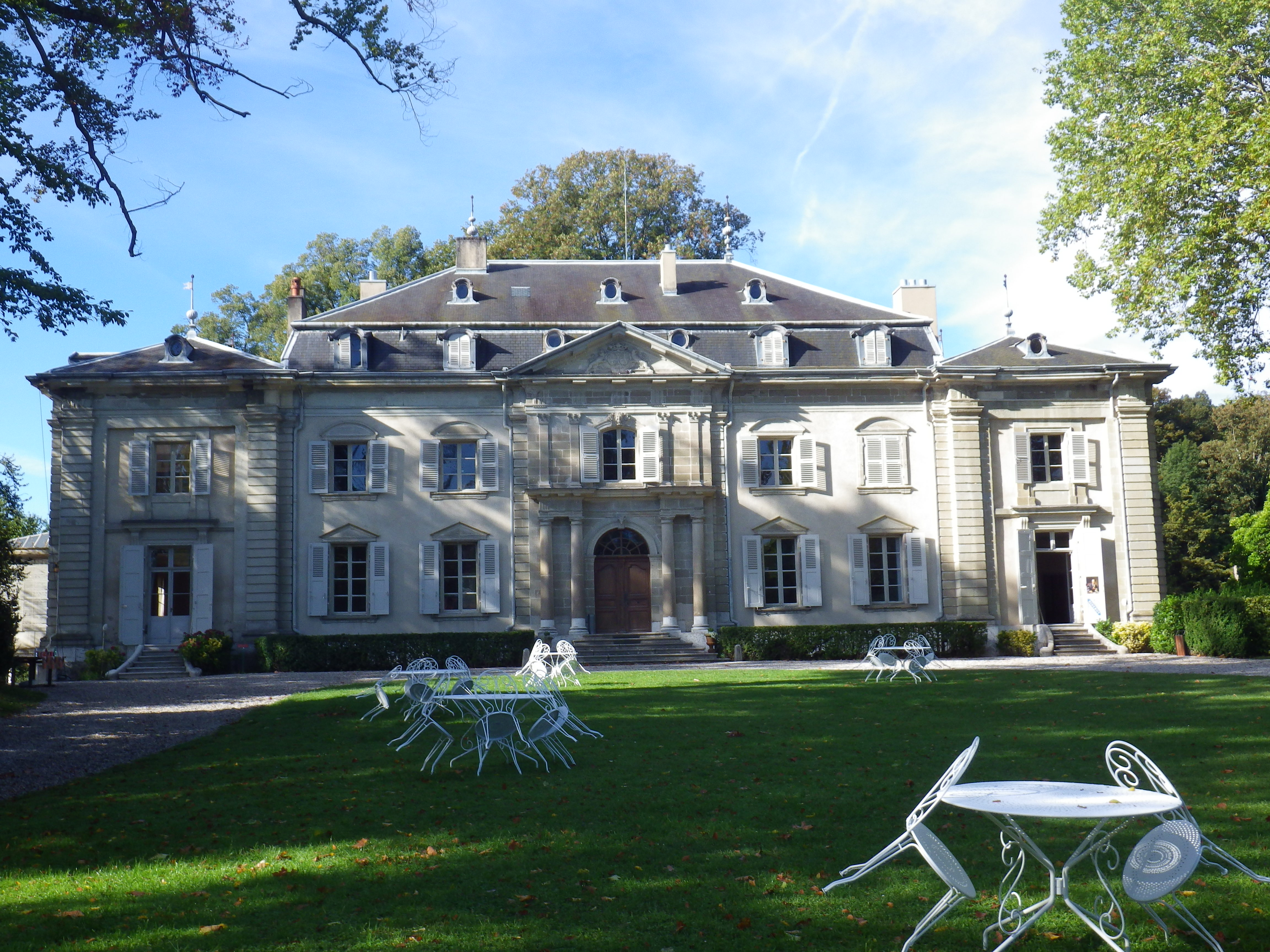 Château de Voltaire à Ferney-Voltaire façade côté cours